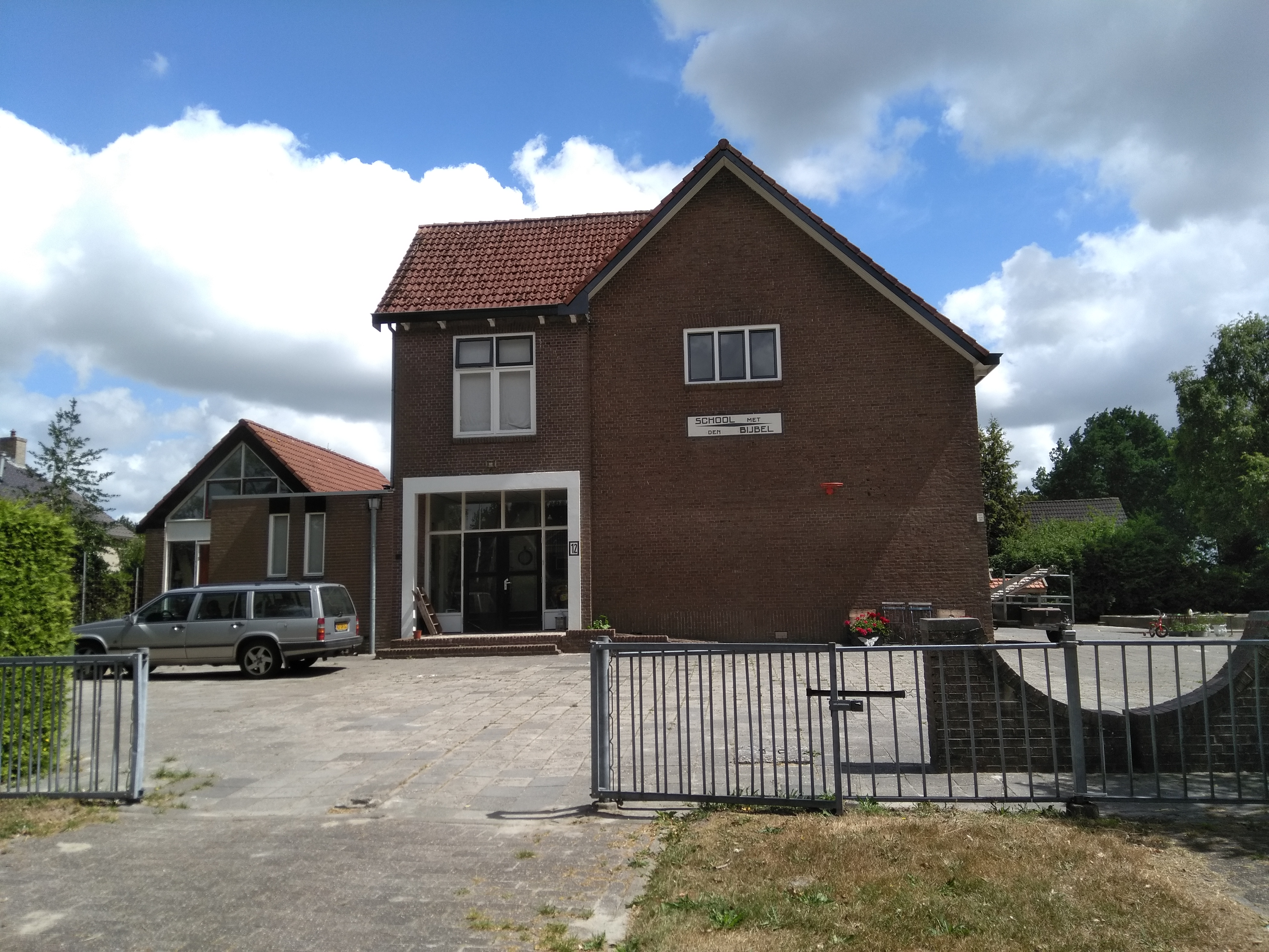 Voormalige Christelijke basisschool in Siegerswoude, gemeente Opsterland, Friesland.